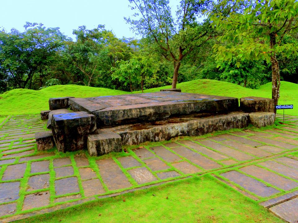 ಕನ್ನಡ: ಕವಿ ಸಮಾಧಿ